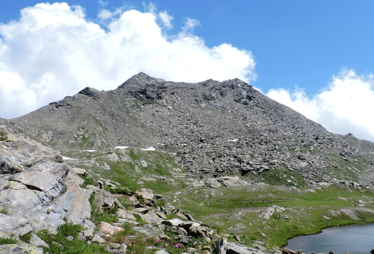 La Cialancia (Alpi Cozie) vista dalla conca dei Tredici Laghi